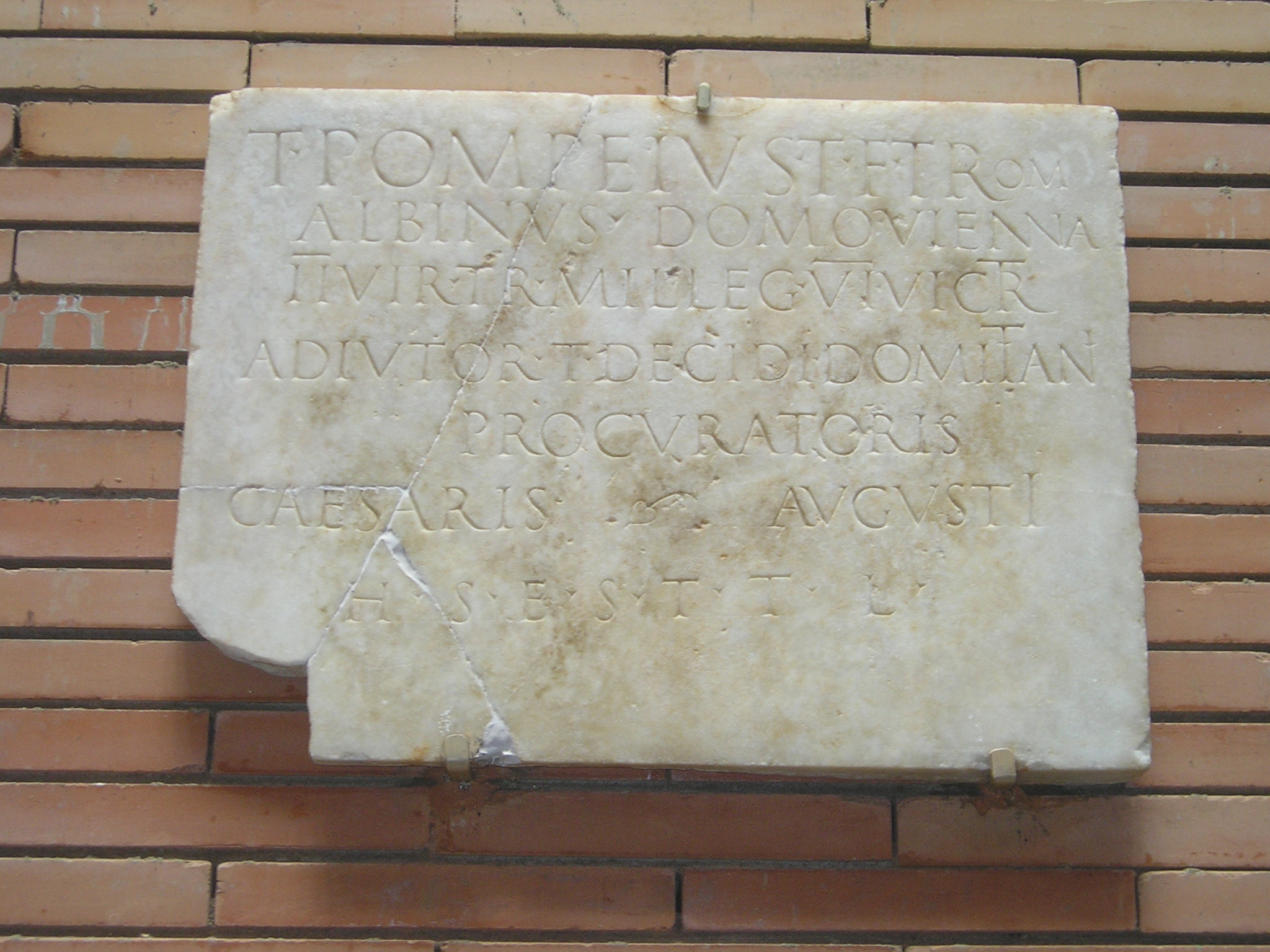 Epitafio de un oficial de la legio VI Victrix. Merida. AE 1935, 5